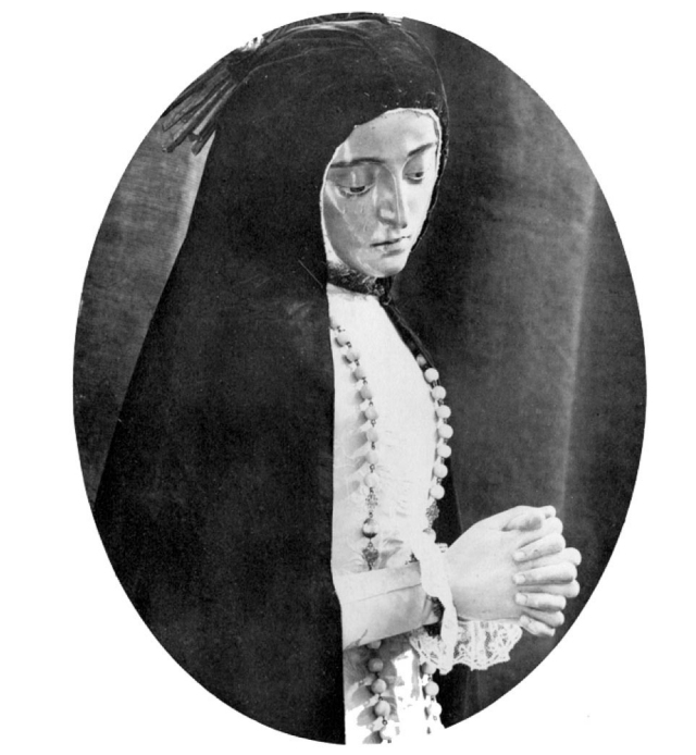 Nuestra Señora de la Soledad. Gaspar Becerra. 1565.